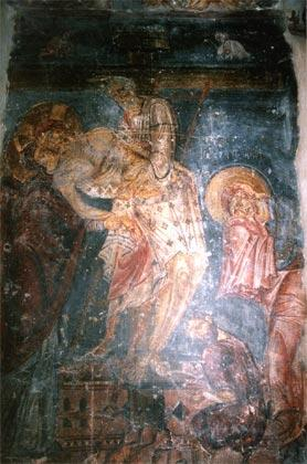 Фреска в "Свети Йоан Богослов", Бер, Гърция.